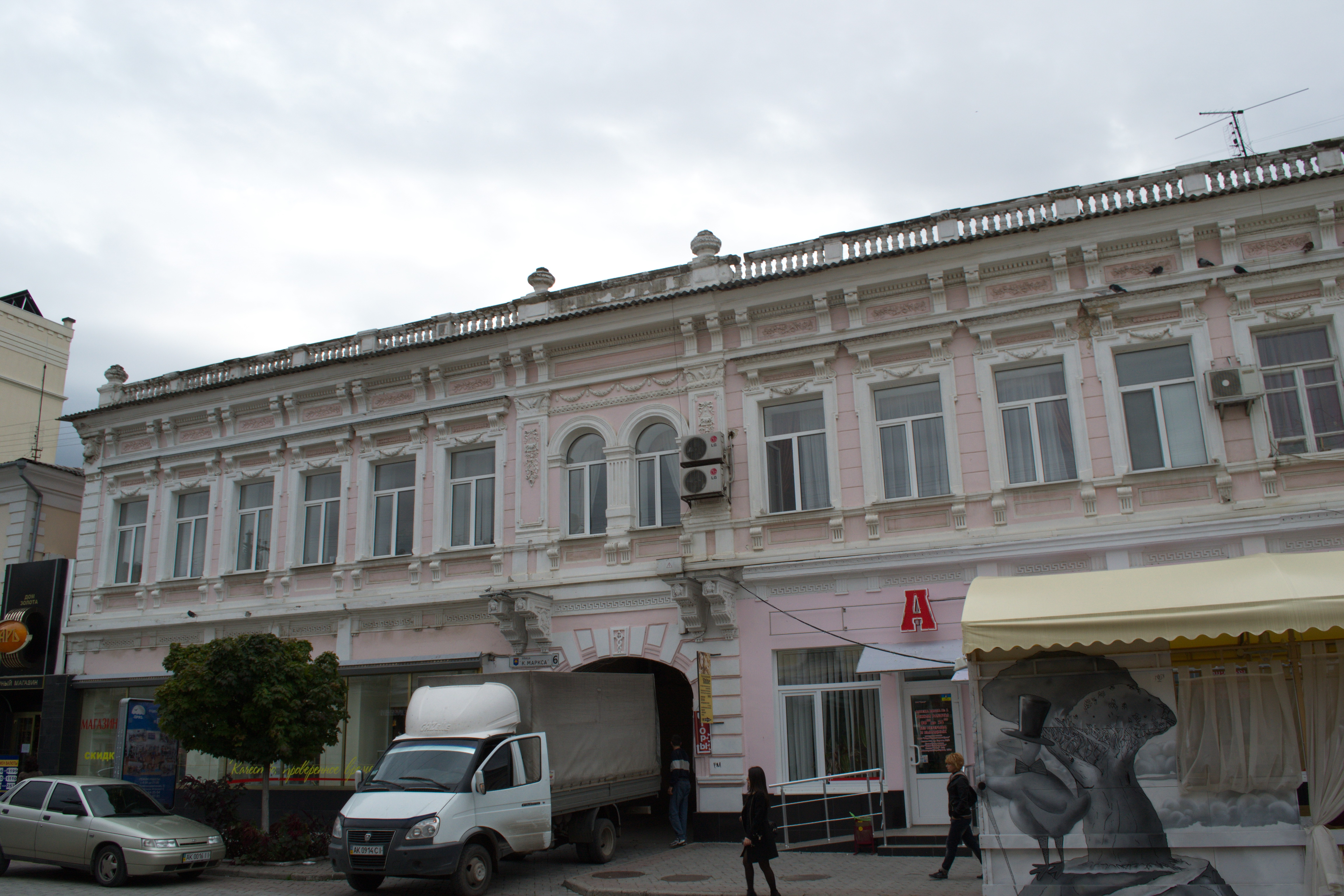 Будинок прибутковий Ф. І. Попе, Сімферополь, вул. К. Маркса, 6, літер «А»